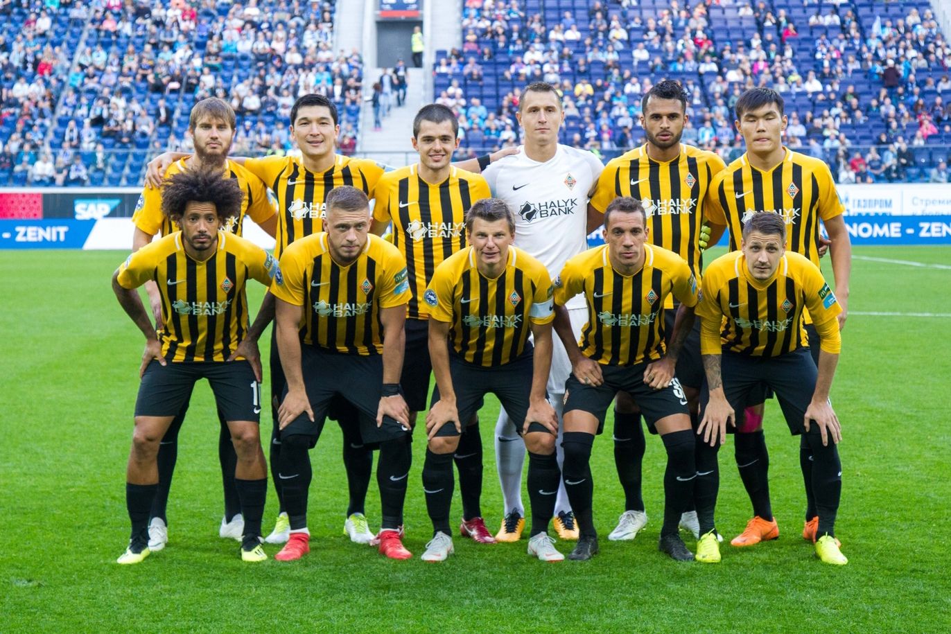 09.09.2018. Россия, Санкт-Петербург, стадион «Санкт-Петербург». Товарищеский матч «Зенит» — «Кайрат»